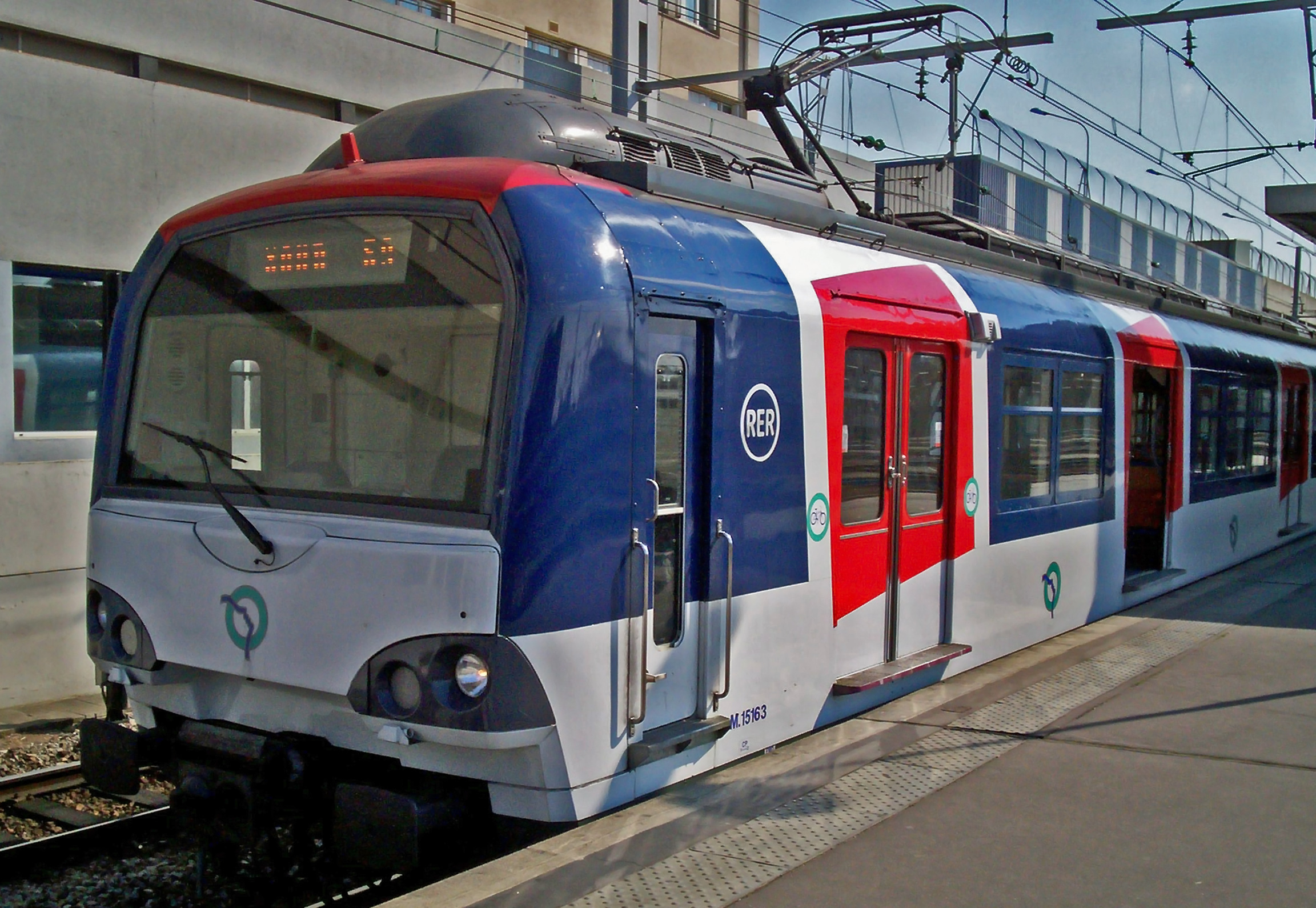 MS61 renovée en gare origine de Boissy-Saint-Léger